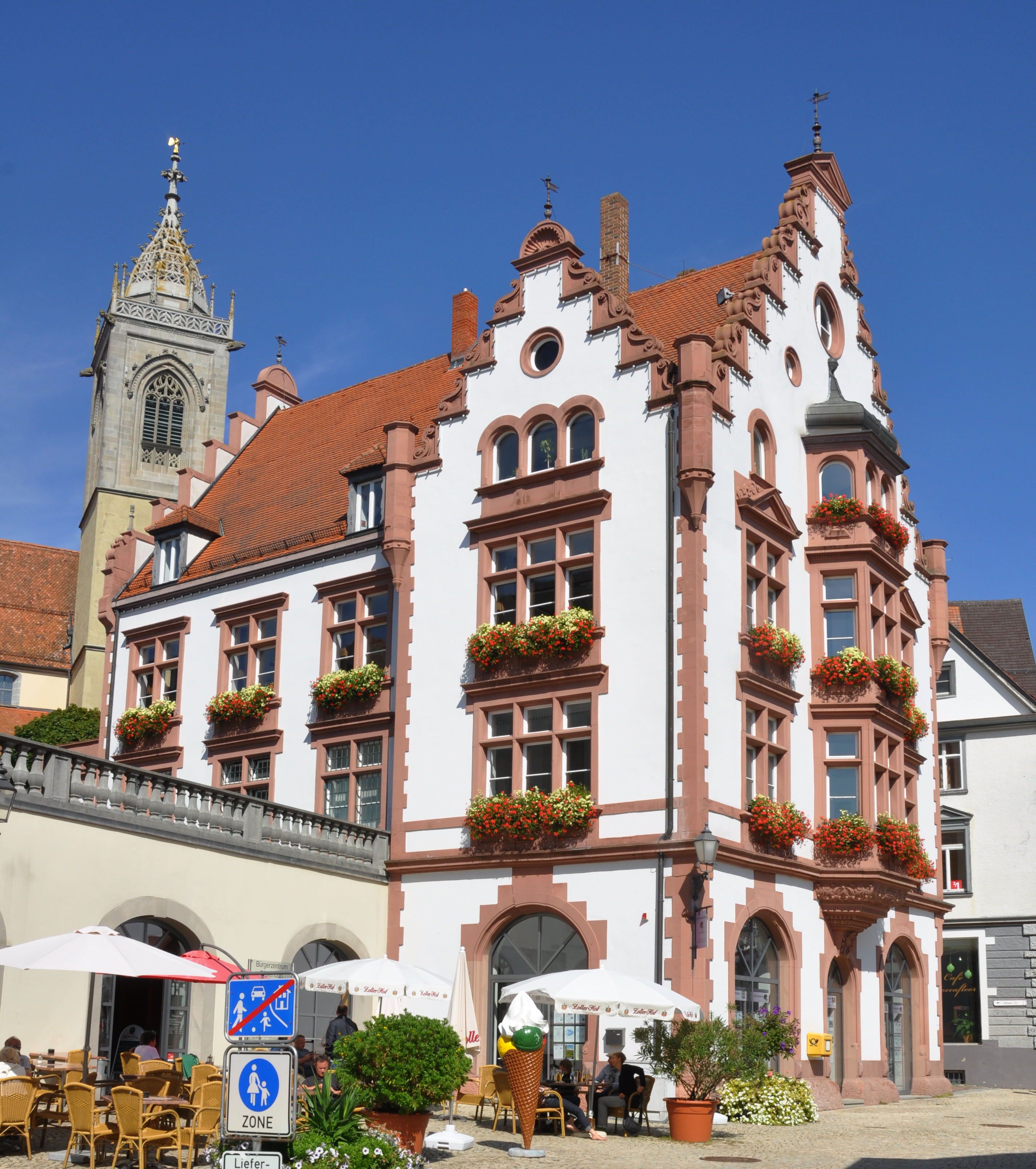 Pfullendorf, Rathaus, Nebengebäude